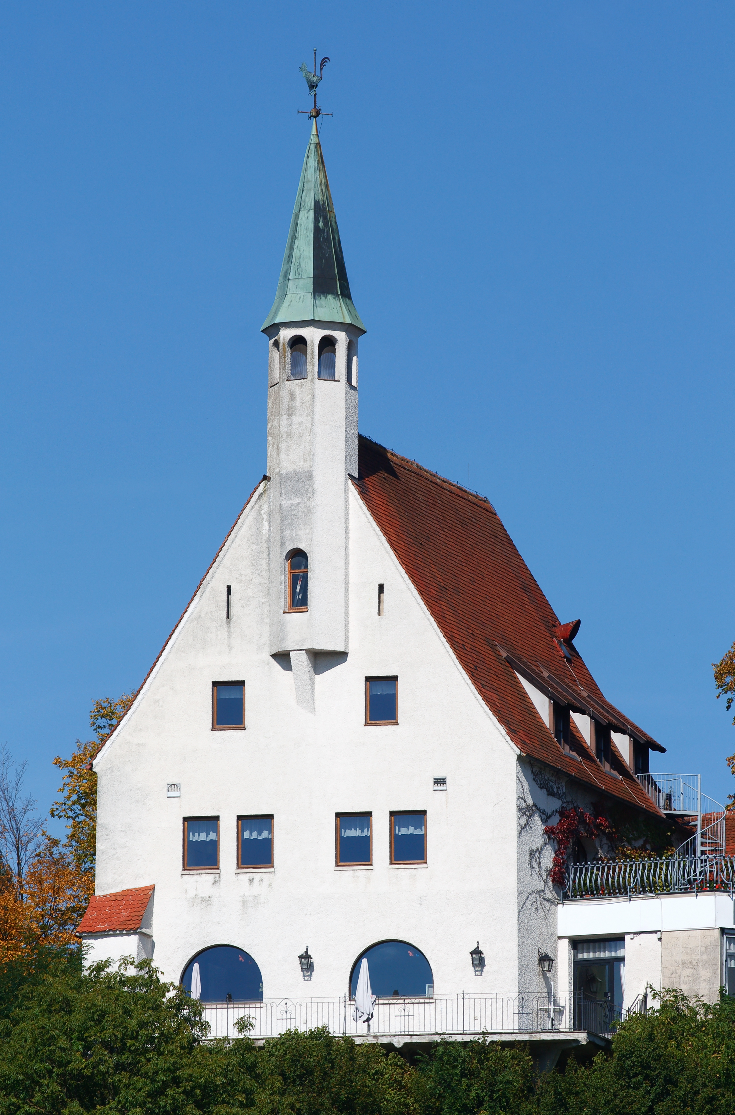 Der Taborturm in der oberösterreichischen Stadt Steyr